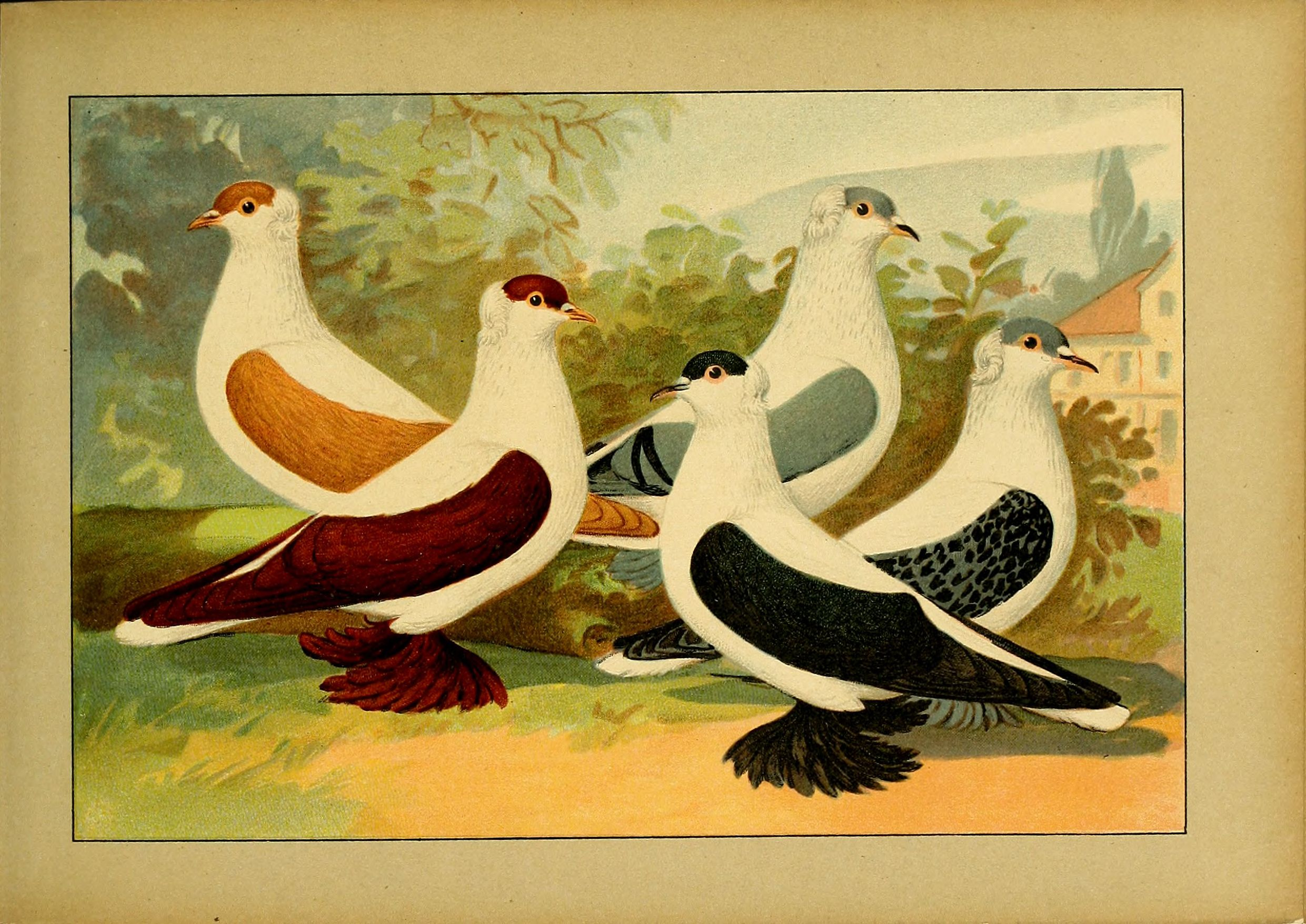 Deutsch